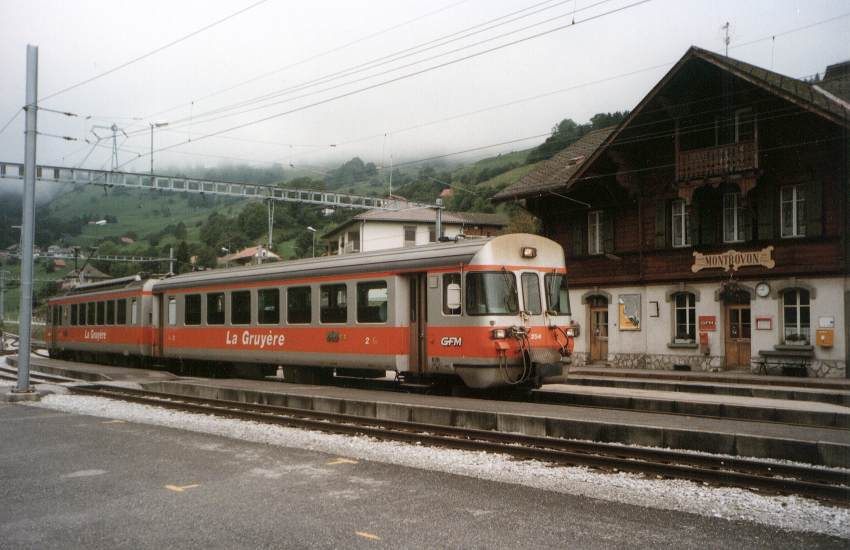 Train navette des Chemins de fer fribourgeois GFM, composé du Be 4/4 151 «La Gruyère» et du Bt 254 à Montbovon.